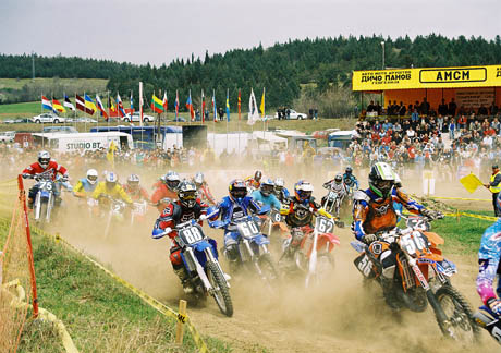 Motocross in Bogorodica village. Macedonia